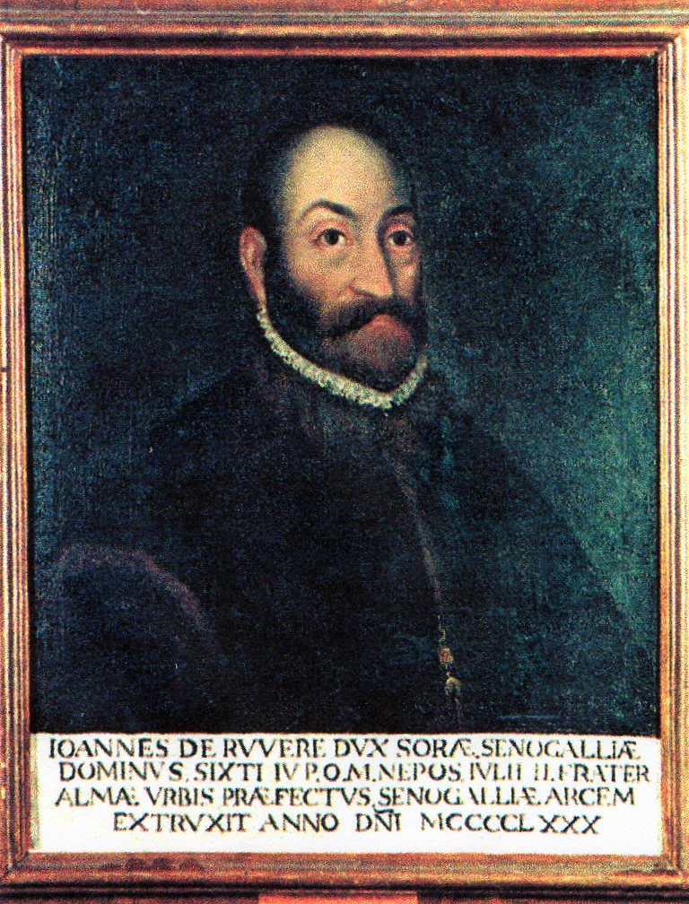 ritratto del signore di Senigallia Giovanni Della Rovere (1457-1501)